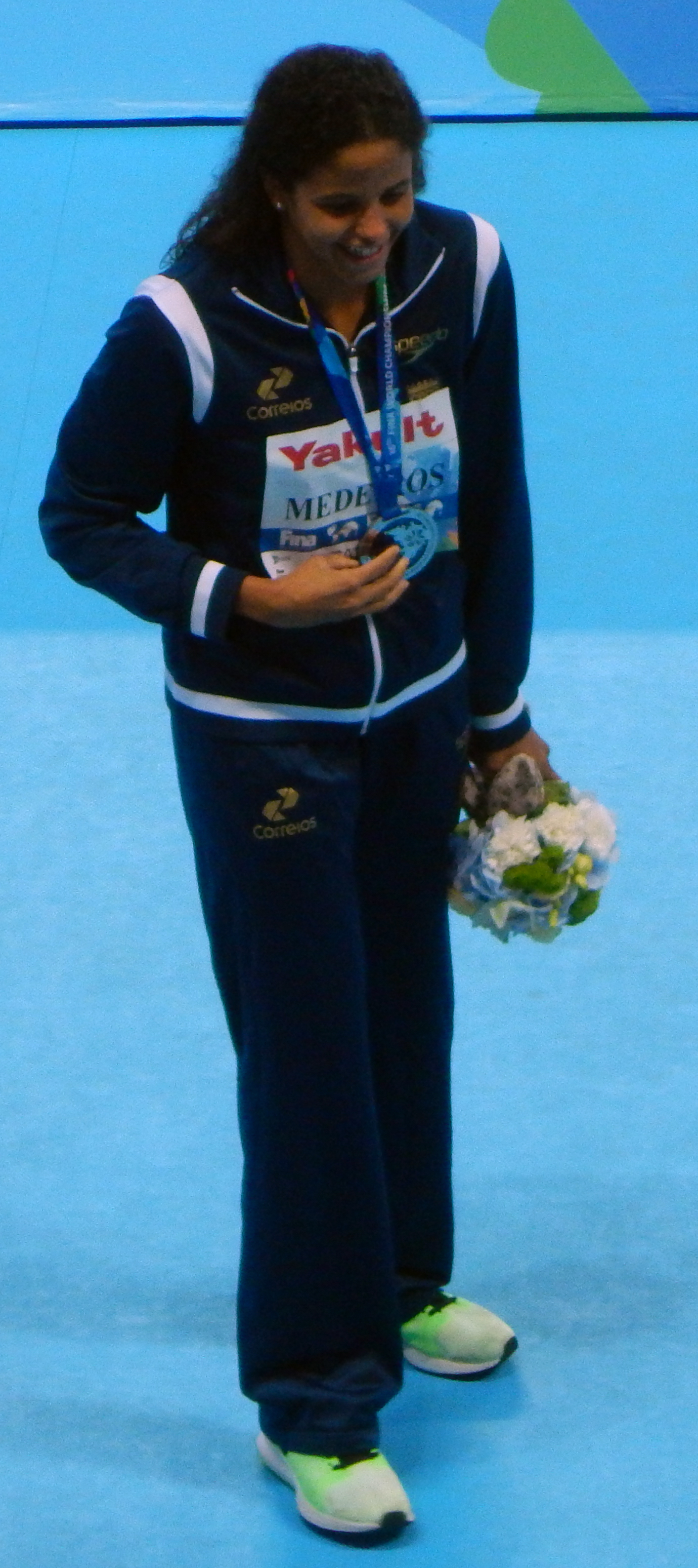 Этиене Медейрош на чемпионате мира в Казани